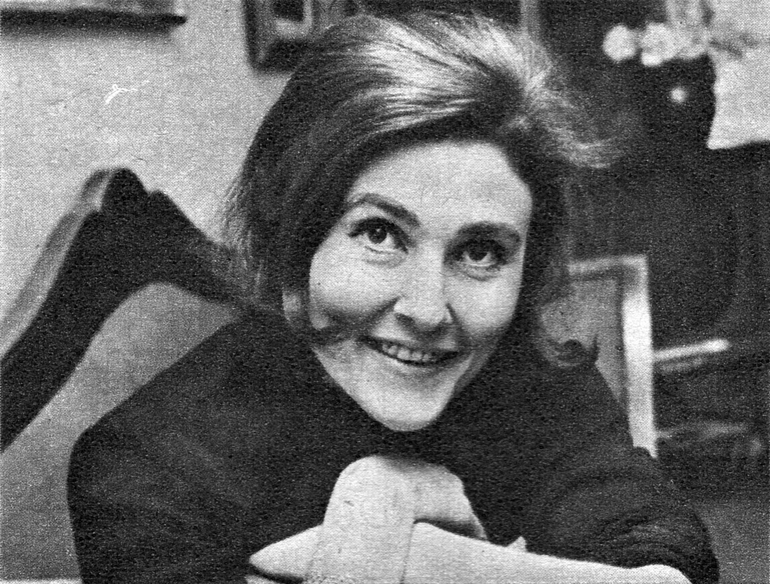 Öllegård Wellton.